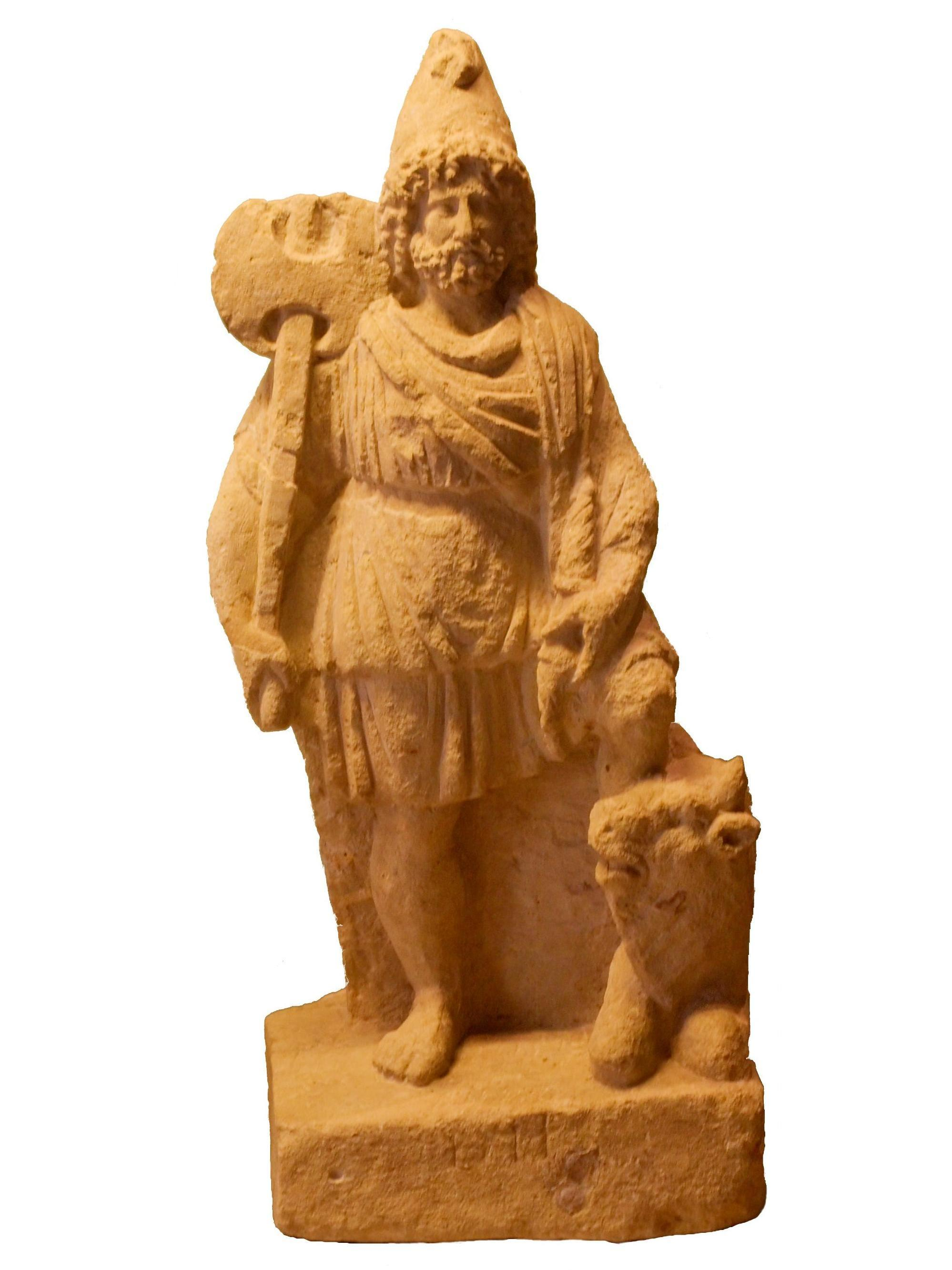 Als Hochrelief gearbeitete Statuette des Jupiter Dolichenus. Er ist in ein Zivilgewand gekleidet. Die Sockelinschrift lautet: DIIS (Den Göttern)